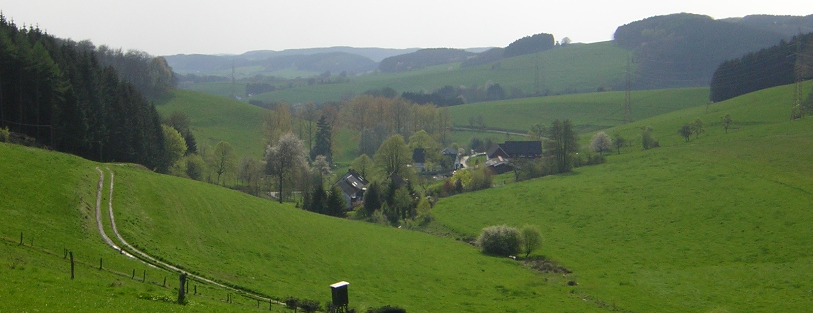 Beschreibung: Berrenberg in Wipperfürth Fotograf: Trexer Aufgenommen: 2005 mit Nikon Coolpix 2200 17:30, 23. Apr 2005 Trexer 1598 x 616 (213.334 Byte) (* Beschreibung: :de:Berrenberg in :de:Wipperfürth * Fotograf: :de:Trexer * Aufgenommen: 2005 mit Nikon Coolpix 2200 GFDL )